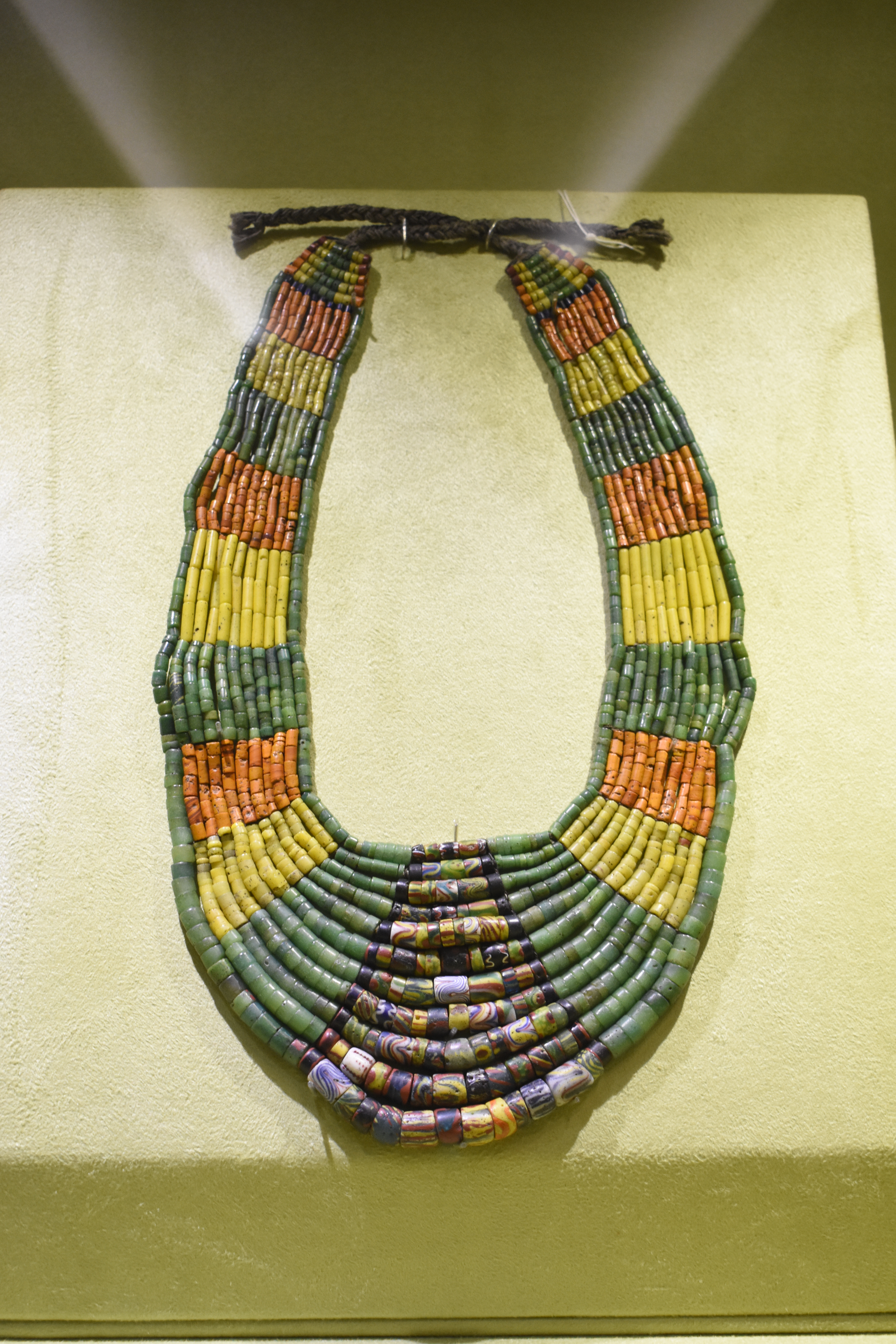 中文（台灣）: 雅美(達悟)族男子胸飾